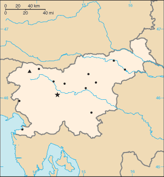 Harta Sllovenia